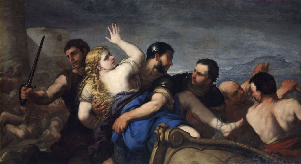 L'enlèvement d'Hélène